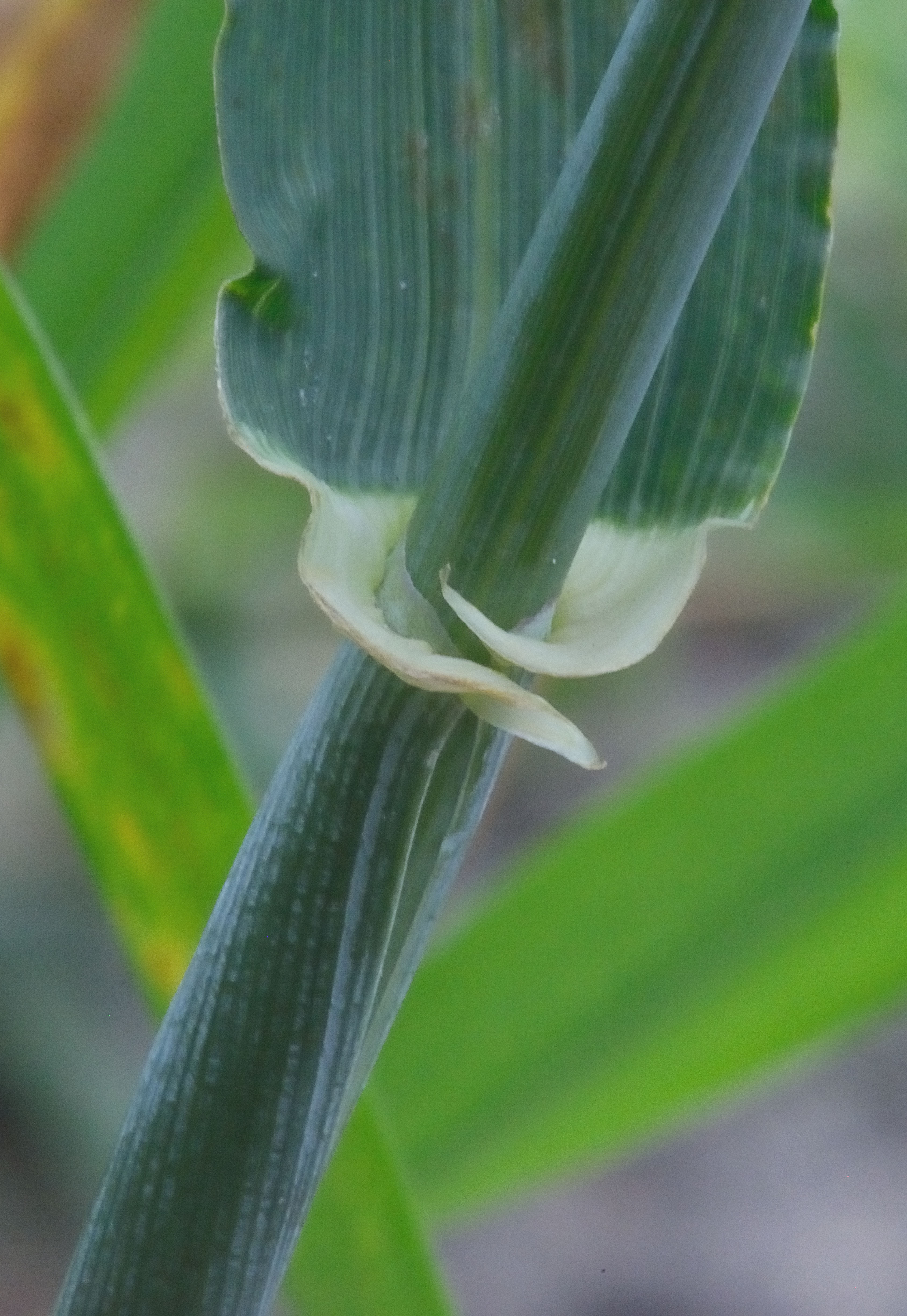 (Wintergerst oortjes en tongetje). Hordeum vulgare (winter barley) auricles and ligule